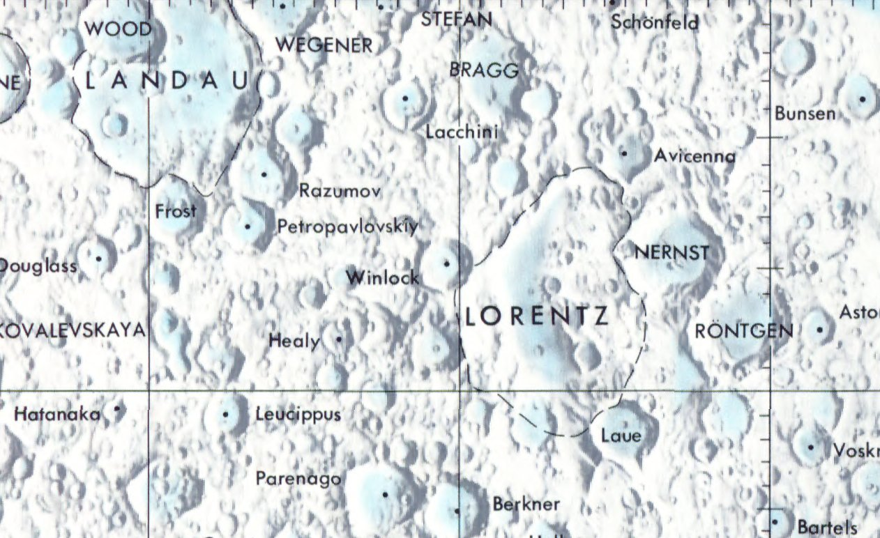 Cráter lunar Winlock. Localización. (Lunar Chart LPC1. Second Edition)